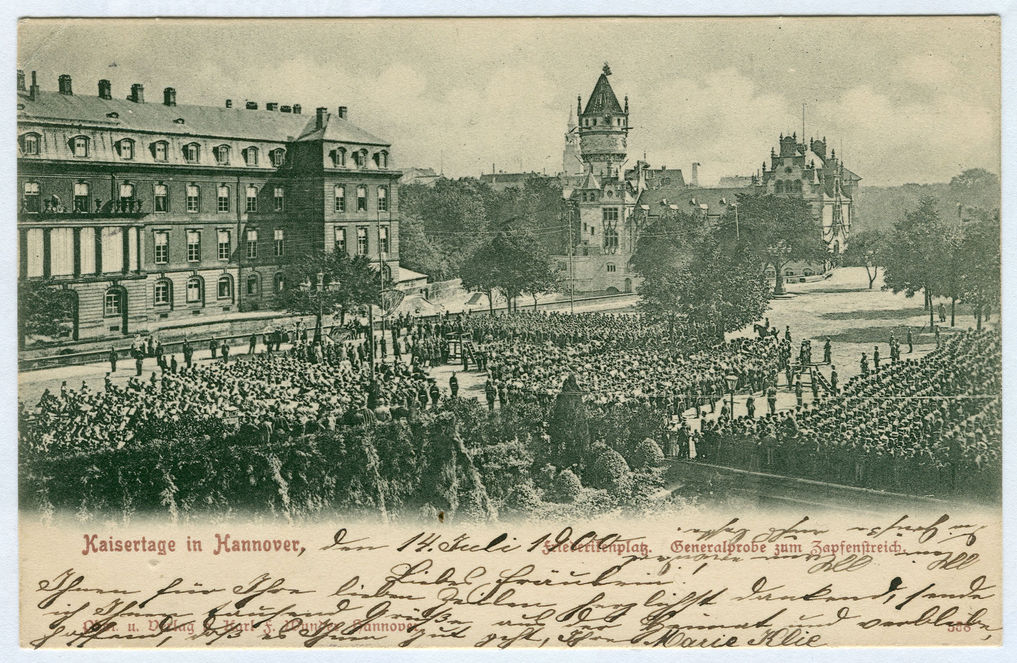 Generalprobe zum Zapfenstreich vor dem Leineschloss anläßlich des Besuches von Kaiser Wilhelm II. nebst Gattin in Hannover.